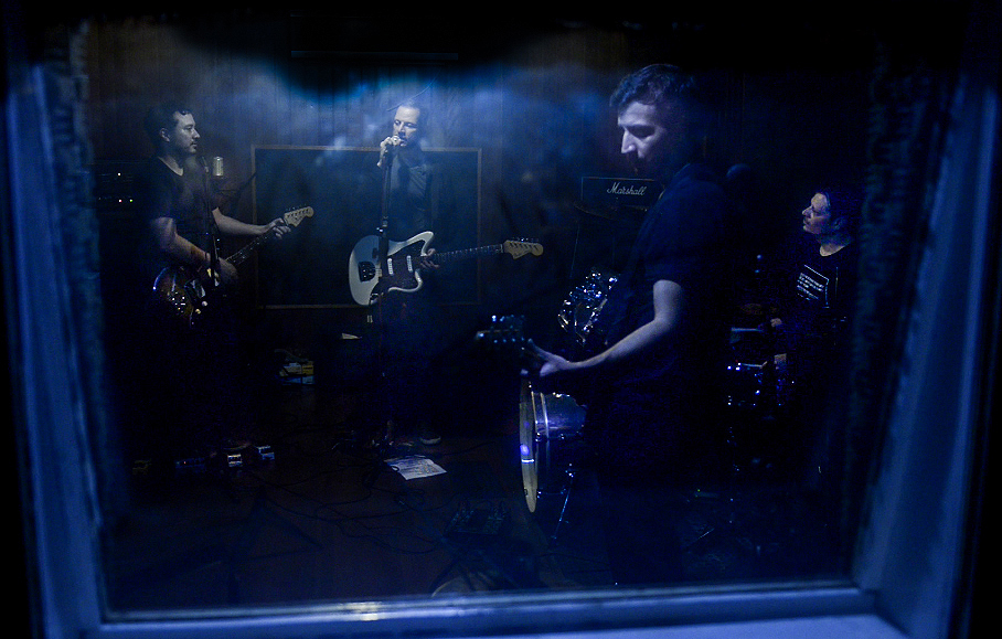 Low Dream